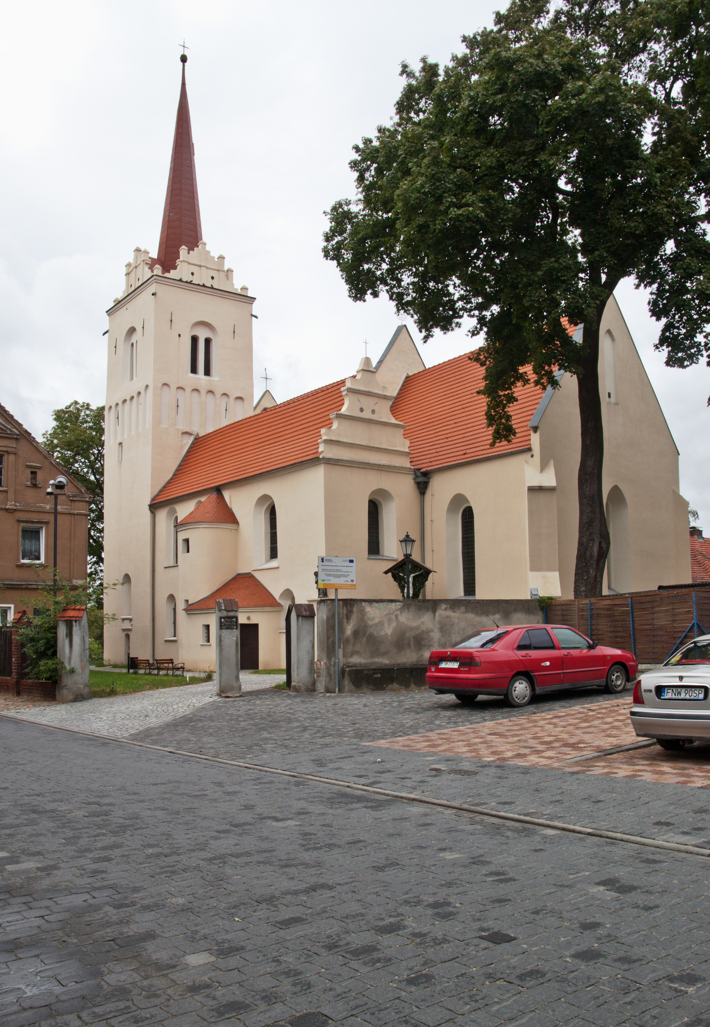 Nowe Miasteczko - kościół parafialny p.w. św. Marii Magdaleny, mur., XIV, XV/XVI w. (zabytek nr 17(205) z 31.05.1950)